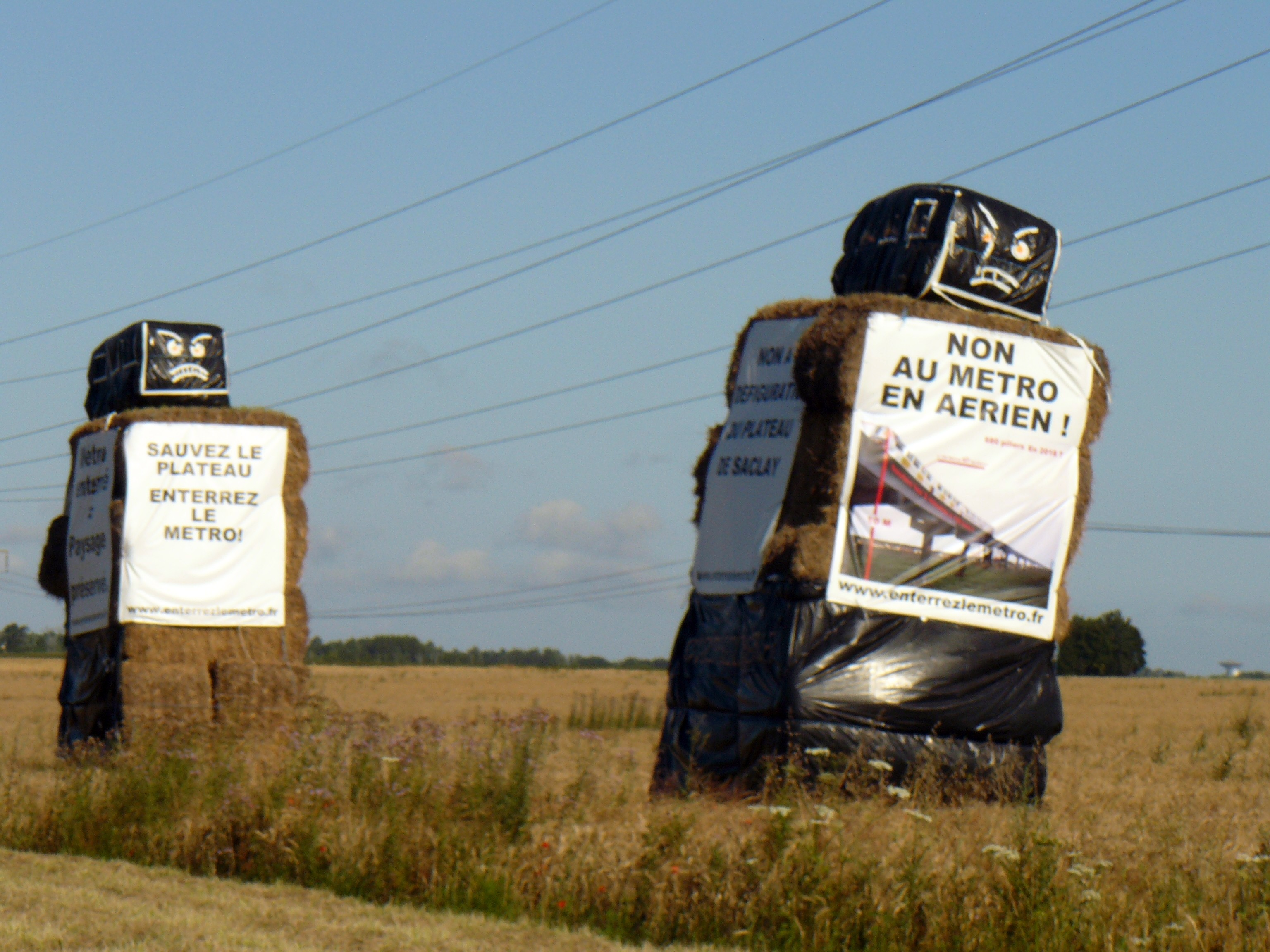 Opposition au projet de métro aérien sur le Plateau de Saclay (Essonne, France). Juillet 2012